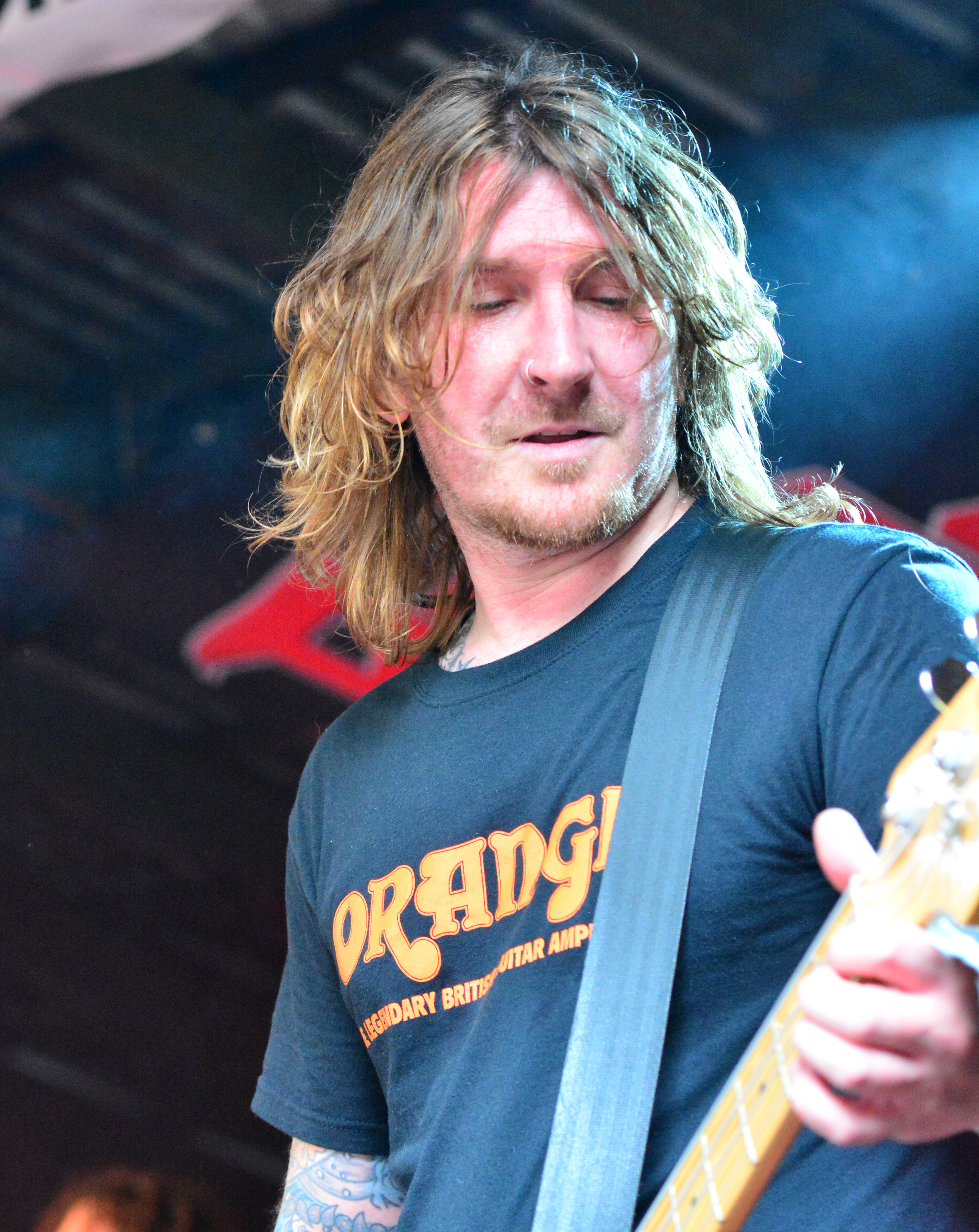 Gavin Gray von Tygers of Pan Tang beim Headbangers Open Air 2014